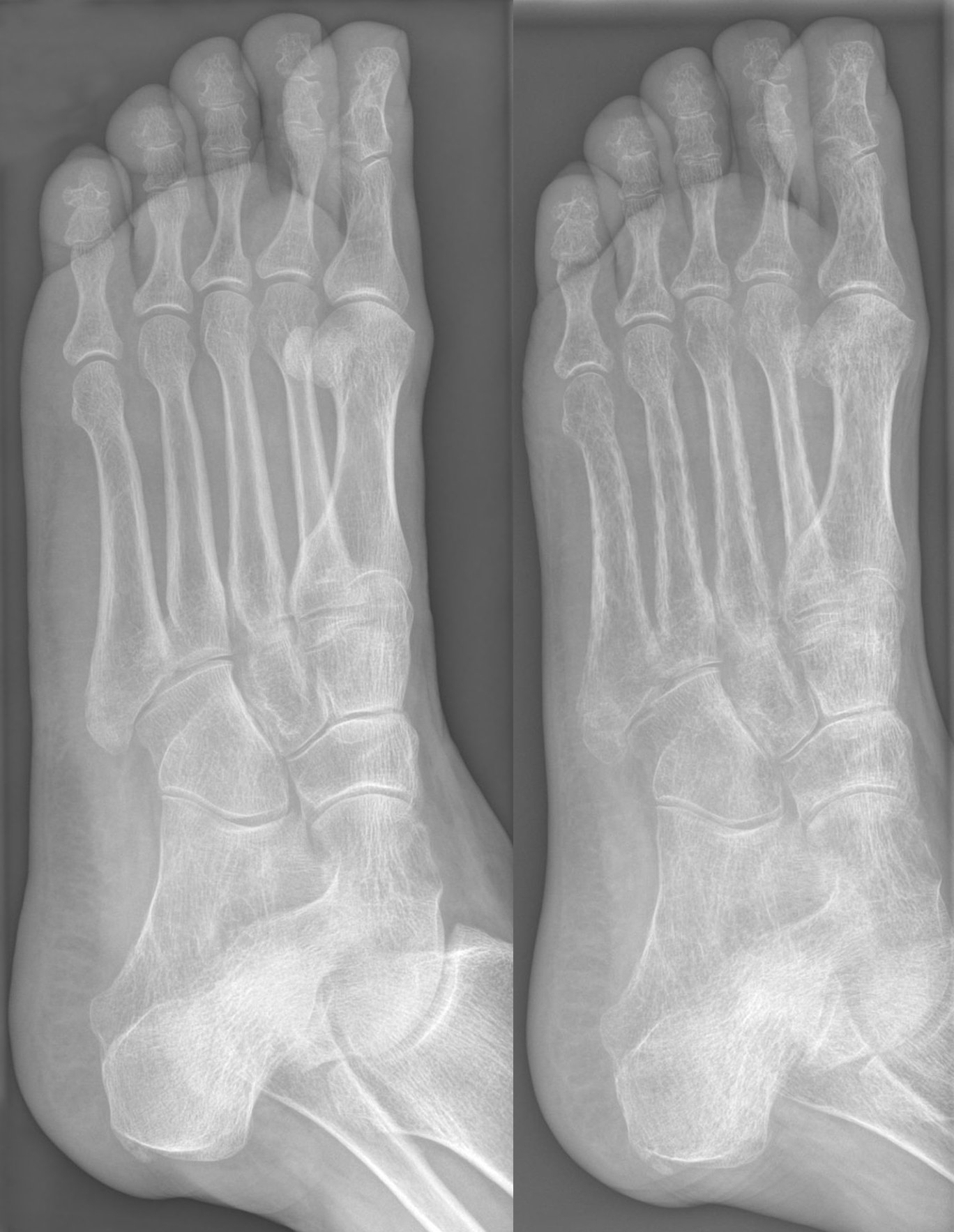 Der Verlauf (links Unfallaufnahme mit Fraktur an der Basis des Os metatarsale 5, rechts ca. 5 Wochen später) zeigt eine massive Demineralisation des gesamten Fußskeletts im Sinne einer Inaktivitätsosteoporose.